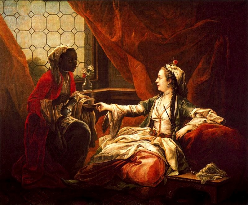 représentant Mme de Pompadour